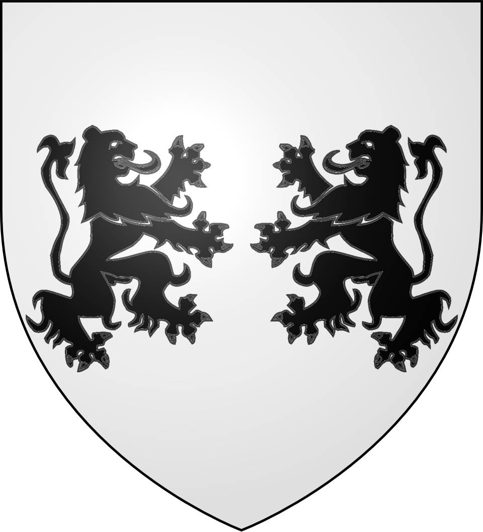 Blason de la ville d'Angeot (Territoire-de-Belfort) : D'argent aux deux lions affrontés de sable